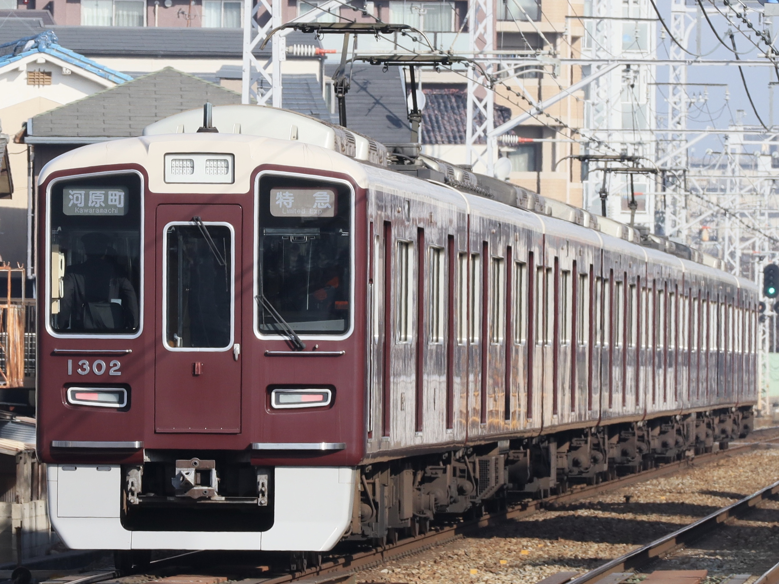 2018年12月21日、西山天王山駅において撮影。